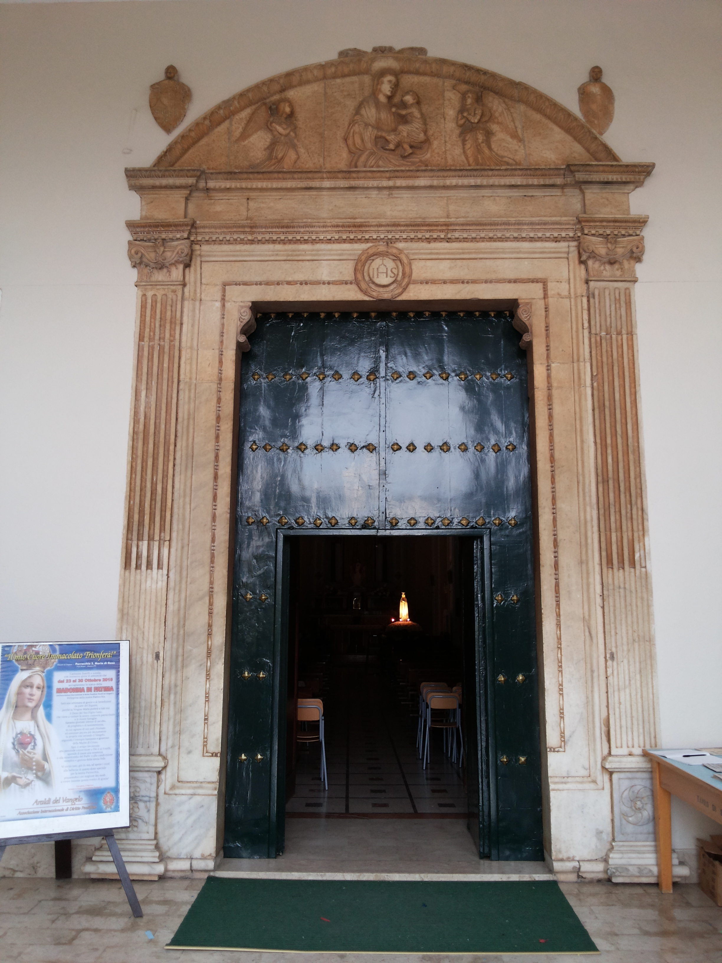 Portale della chiesa di Santa Maria di Gesù (Alcamo), opera di Bartolomeo Berrettaro